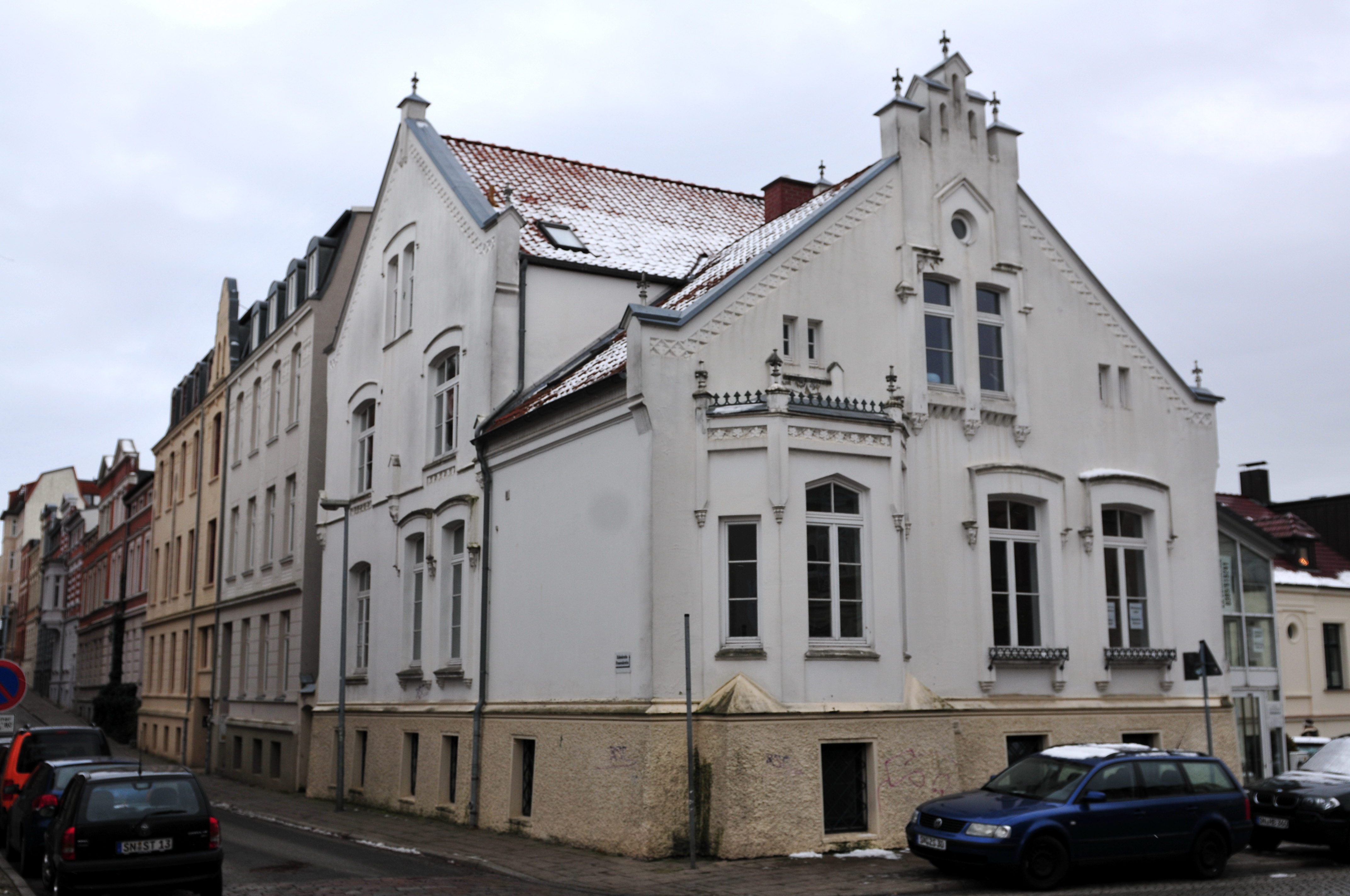 Das denkmalgeschützte Wohn- und Geschäftshaus Schelfstraße 26 in Schwerin, Mecklenburg-Vorpommern. Der Baumeister und Architekt Hermann Willebrand ließ es 1898 kurz vor seinem Tod als Stadtvilla für sich erbauen. - Ostwärts gerichteter Blick in die Landreiterstraße (linker Bildrand).